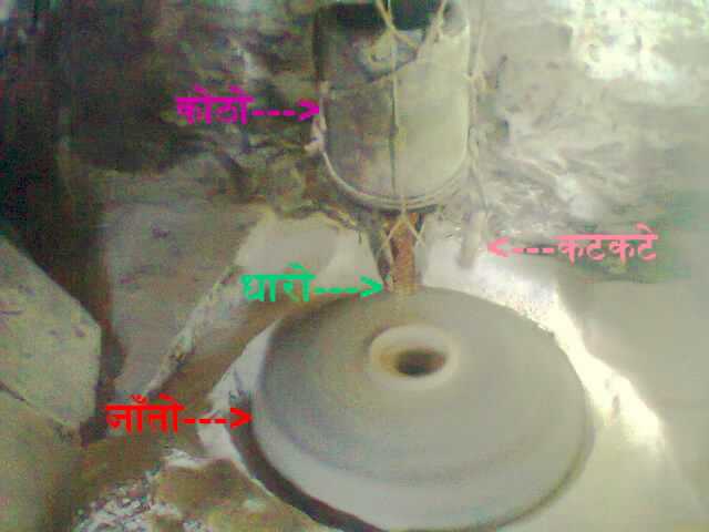 नेपाली: नेपालको दैलेख जिल्लामा बनाइएको एक घट्ट